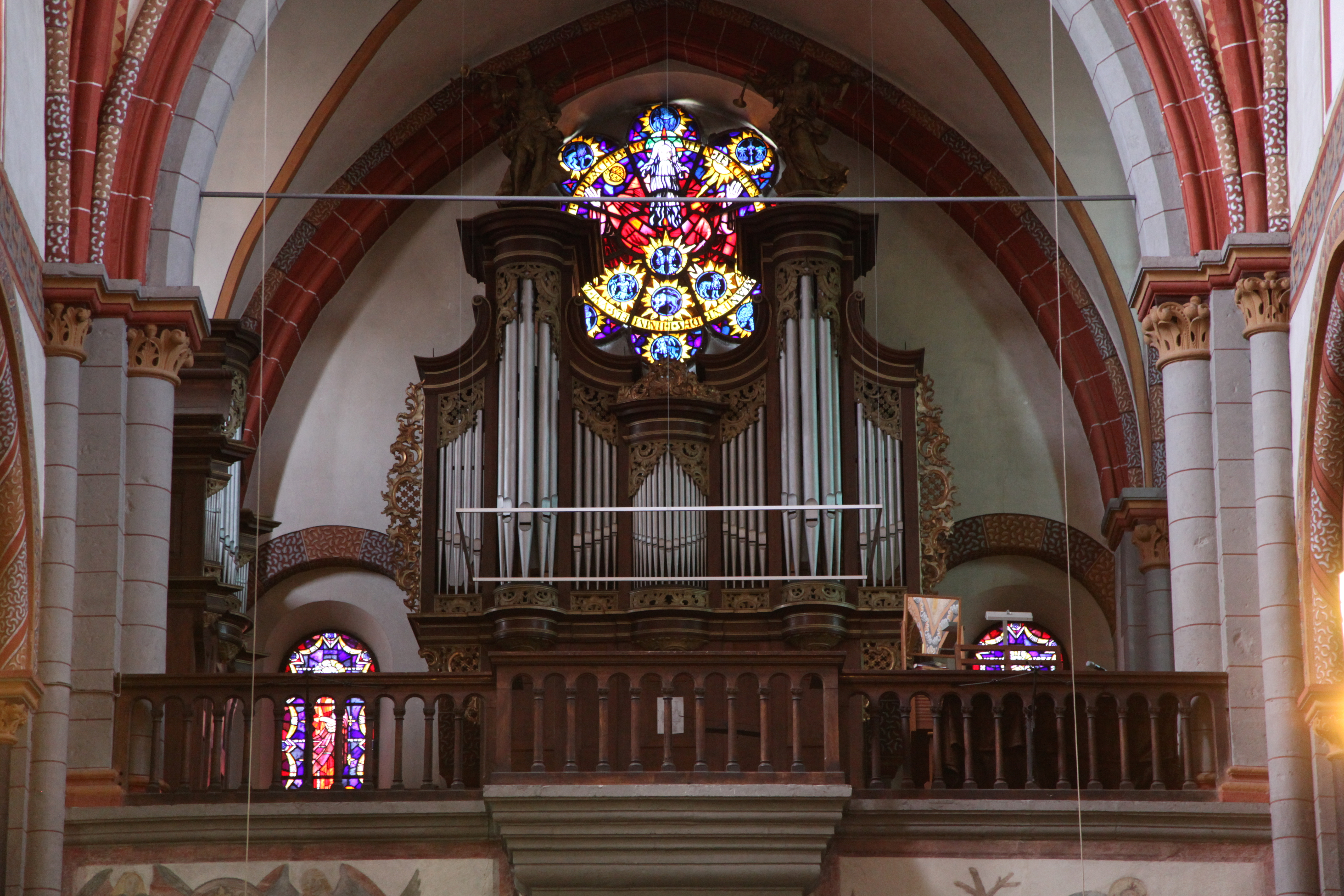 Maria Himmelfahrt / Liebfrauenkirche an der Agrippastraße in Andernach